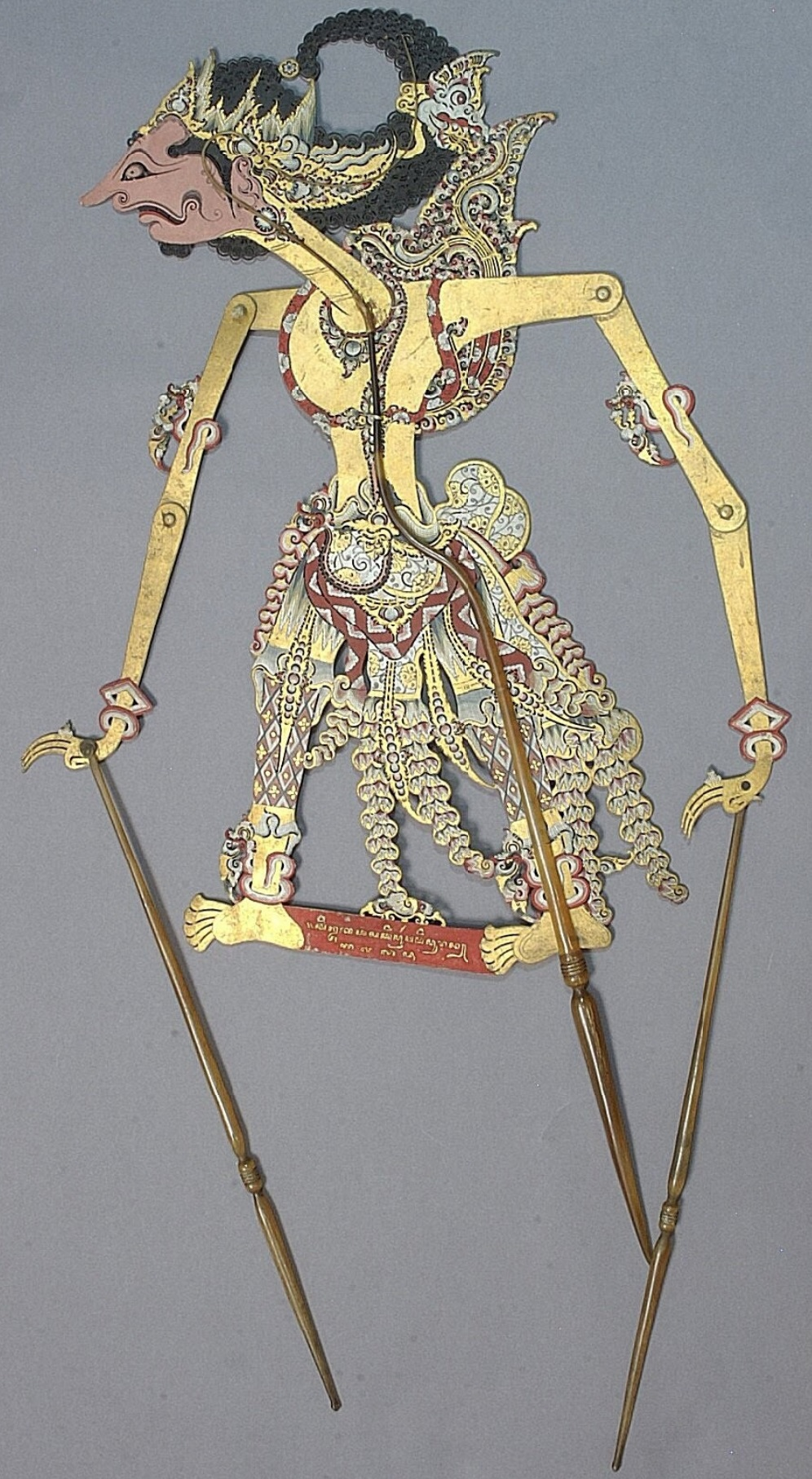 Deze wayang kulit pop stelt Raden Kencaka (Kencakarupa) voor en behoort tot de groep ‘koninklijken’ (katongan). Hij speelt een rol in het wayang purwa repertoire, waar onder andere verhalen zoals Ramayana en Mahabharata zijn opgenomen. Binnen dit repertoire speelt hij een rol in de Pandawa of Mahabrata cyclus. Rupakenca is de zoon van Parasara en Durgandini. Hij werd opgevoed aan het hof van Wirata onder koning Basuketi. Hij werd een kesatria krijger en leidde de legers van Wirata. De Pandawa's verbleven het laatste jaar van hun verbanning in Wirata en Kencaka probeerde toen de vrouw van Yudishtira te verleiden. Bima doodde Kencaka. Een andere versie is dat Kencaka een opstand leidde tegen de koning en toen gedood werd door Bima. De wayangpop is voorzien van de inscriptie 'Raden Kintjaka, werk van het purwadipura'sche, 1778' (1856). De wayangpop is vervaardigd in 1856 en verzameld door Harloff voor de academie in Delft tussen 1856 en 1864. In 1864 werd deze collectie door het Museum Volkenkunde opgenomen.